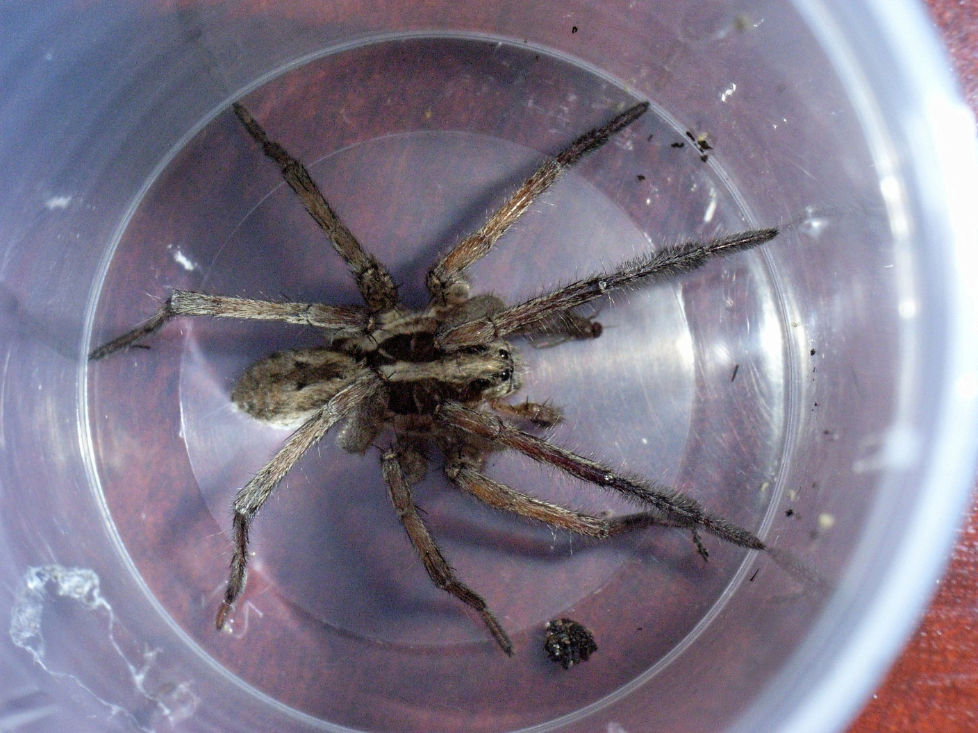 Lycosa tarantula, dorsal view, Barcelona